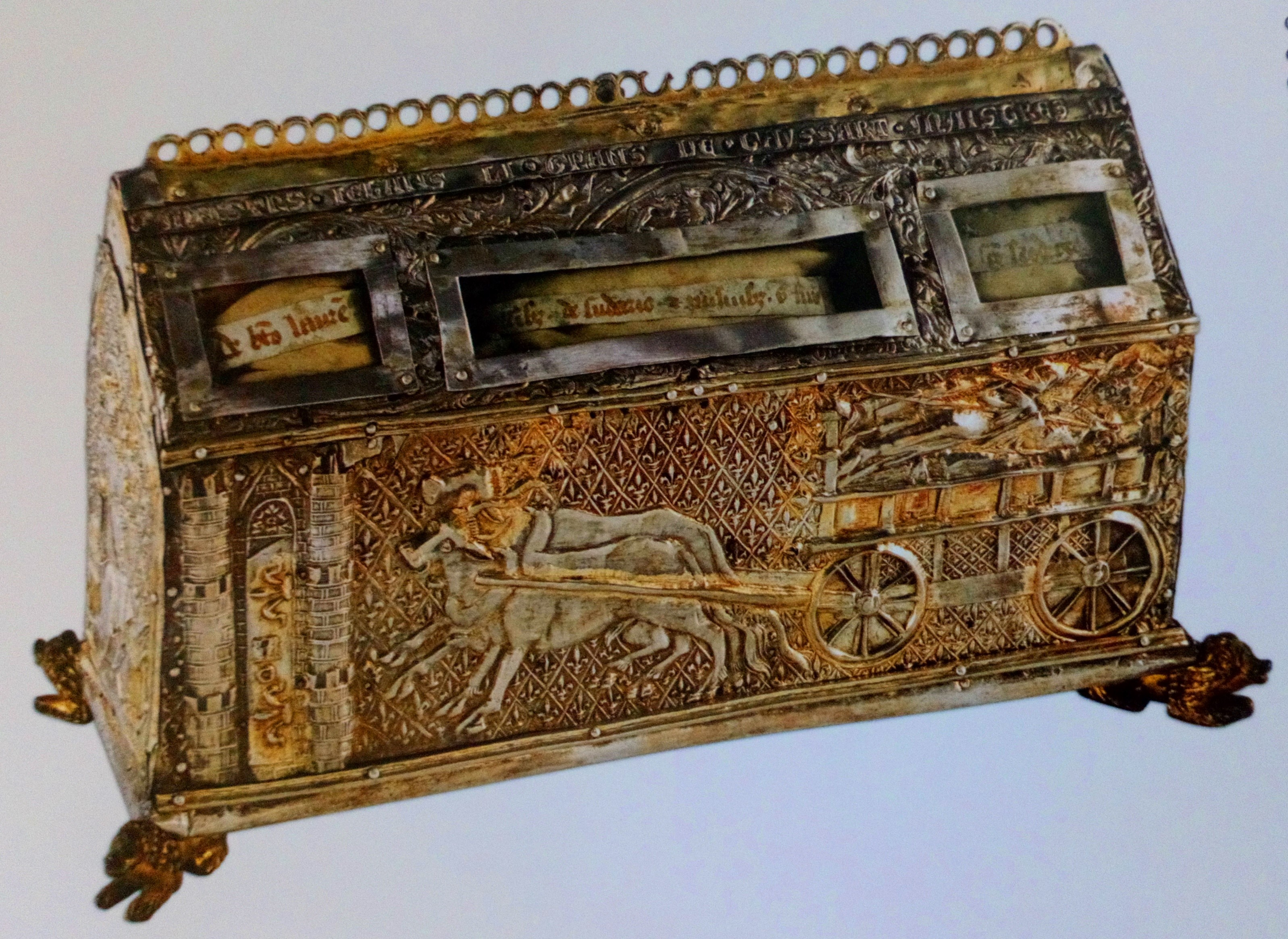 Châsse de saint Fursy 1